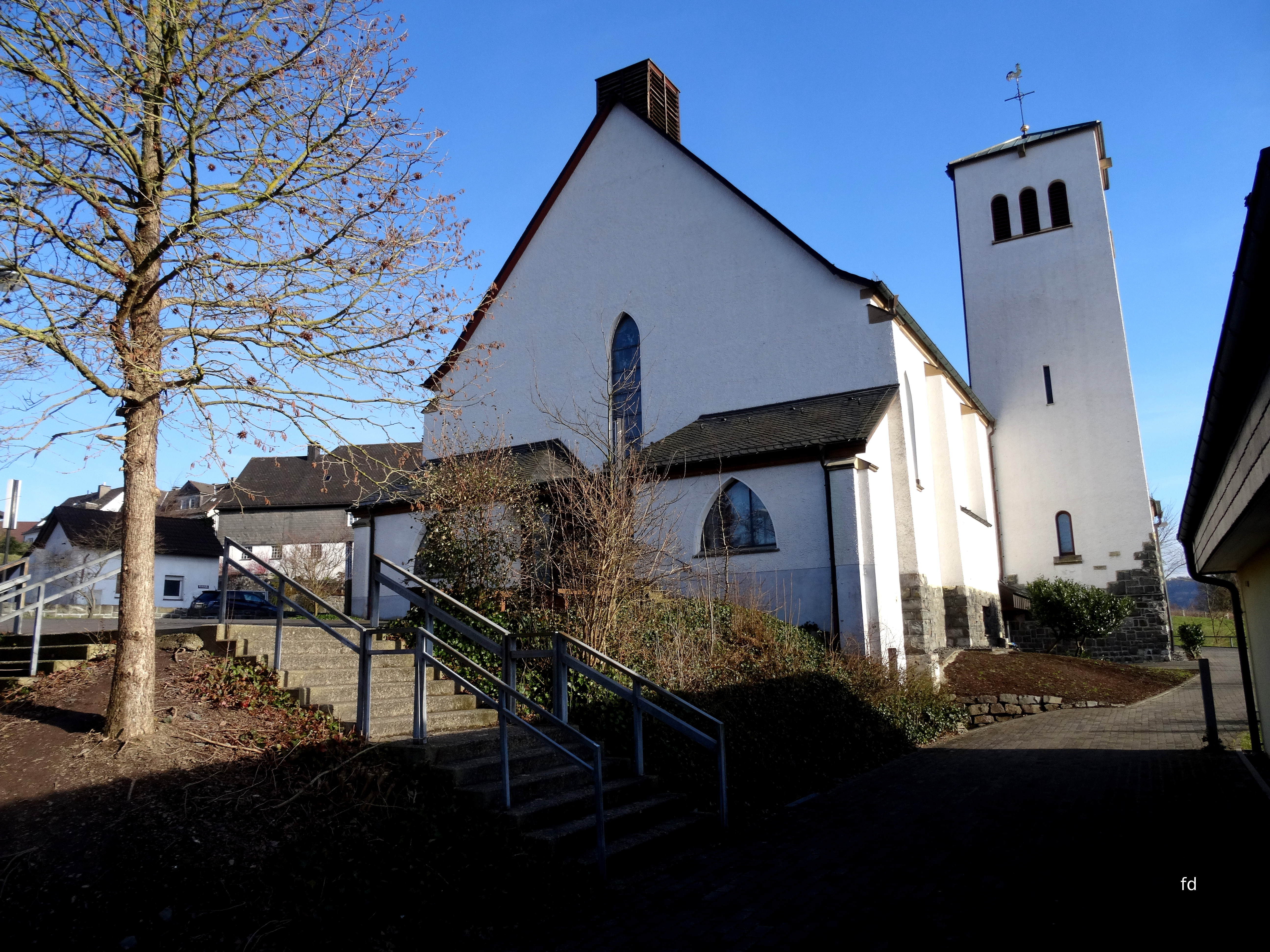 St.Nikolauskirche in Wennemen